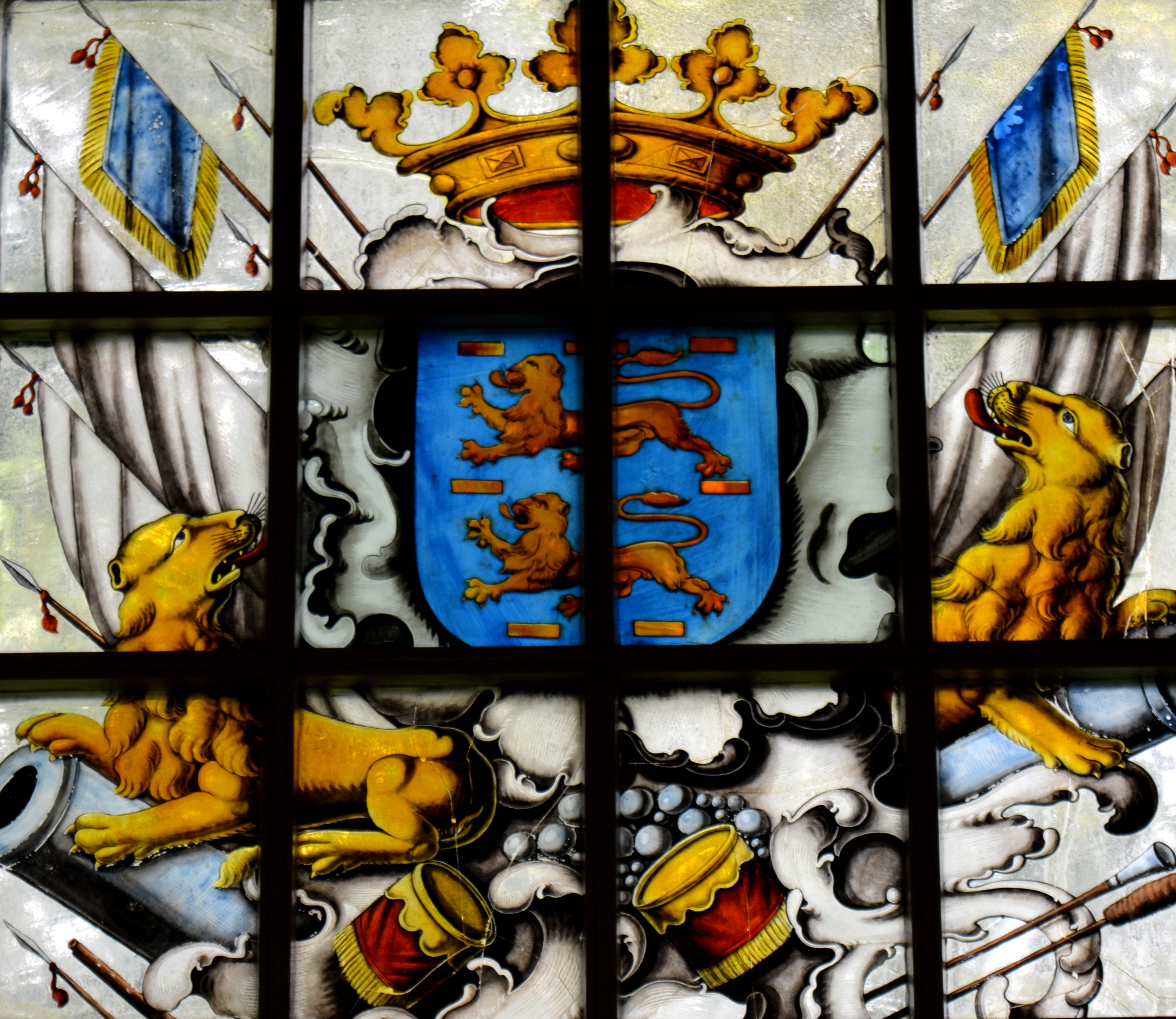 Gertrudistsjerke, Idaerd, Ype Staak-raam fan de Dep. Steaten